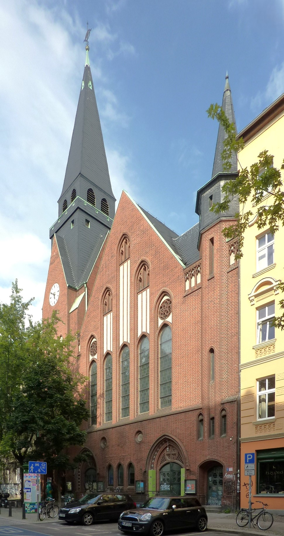 Eliaskirche (Berlin-Prenzlauer Berg)